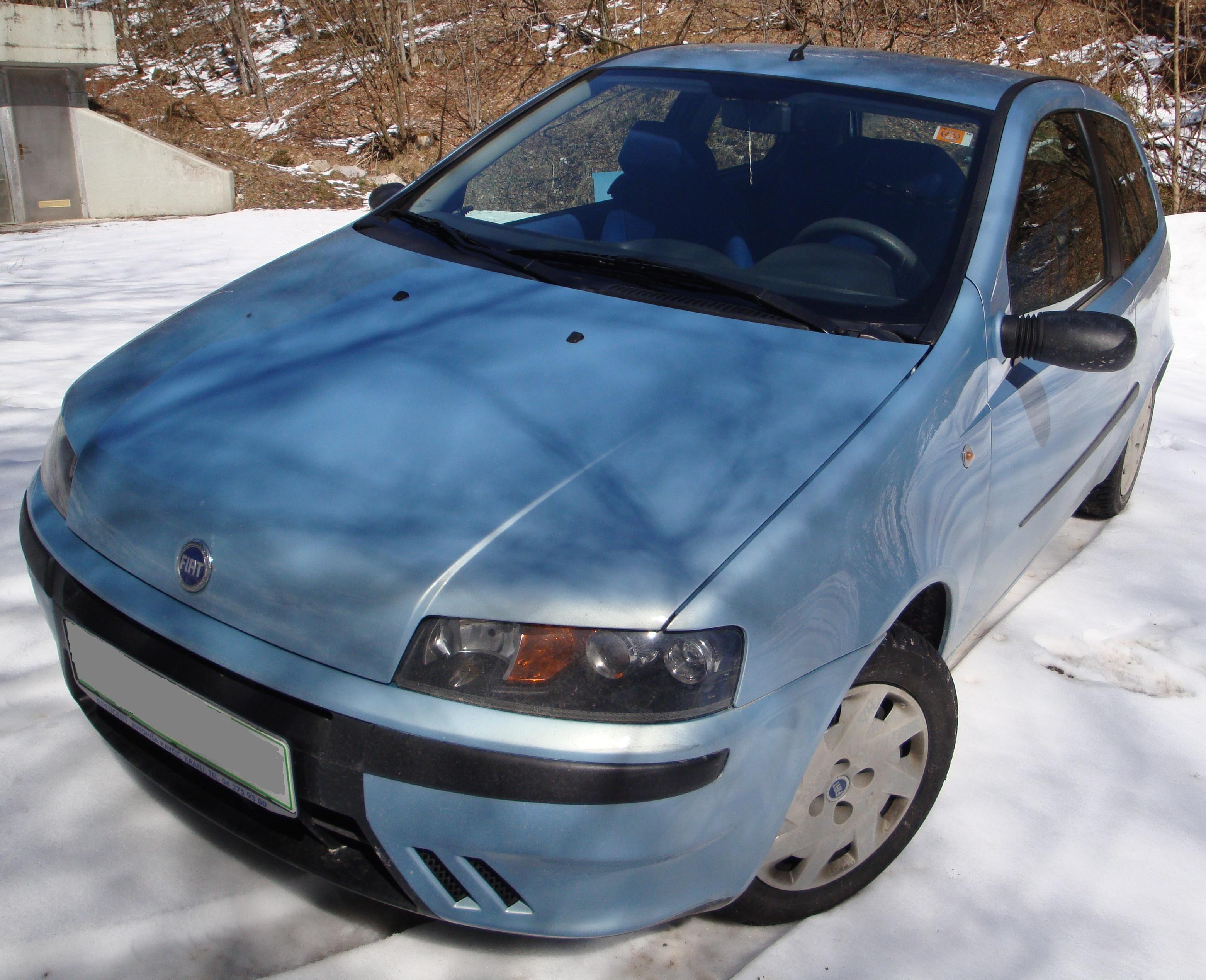 Fiat Punto.